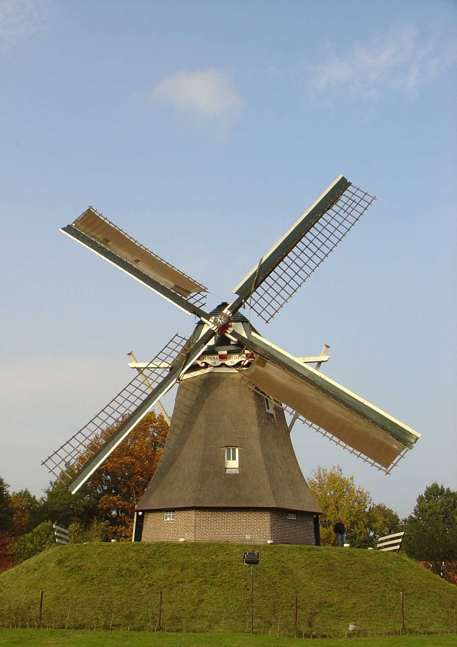 Jantina Helling - een achtkantige beltmolen in Aalden